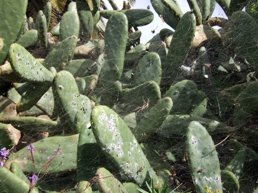 Cochineal on Opuntia cactus, La Palma